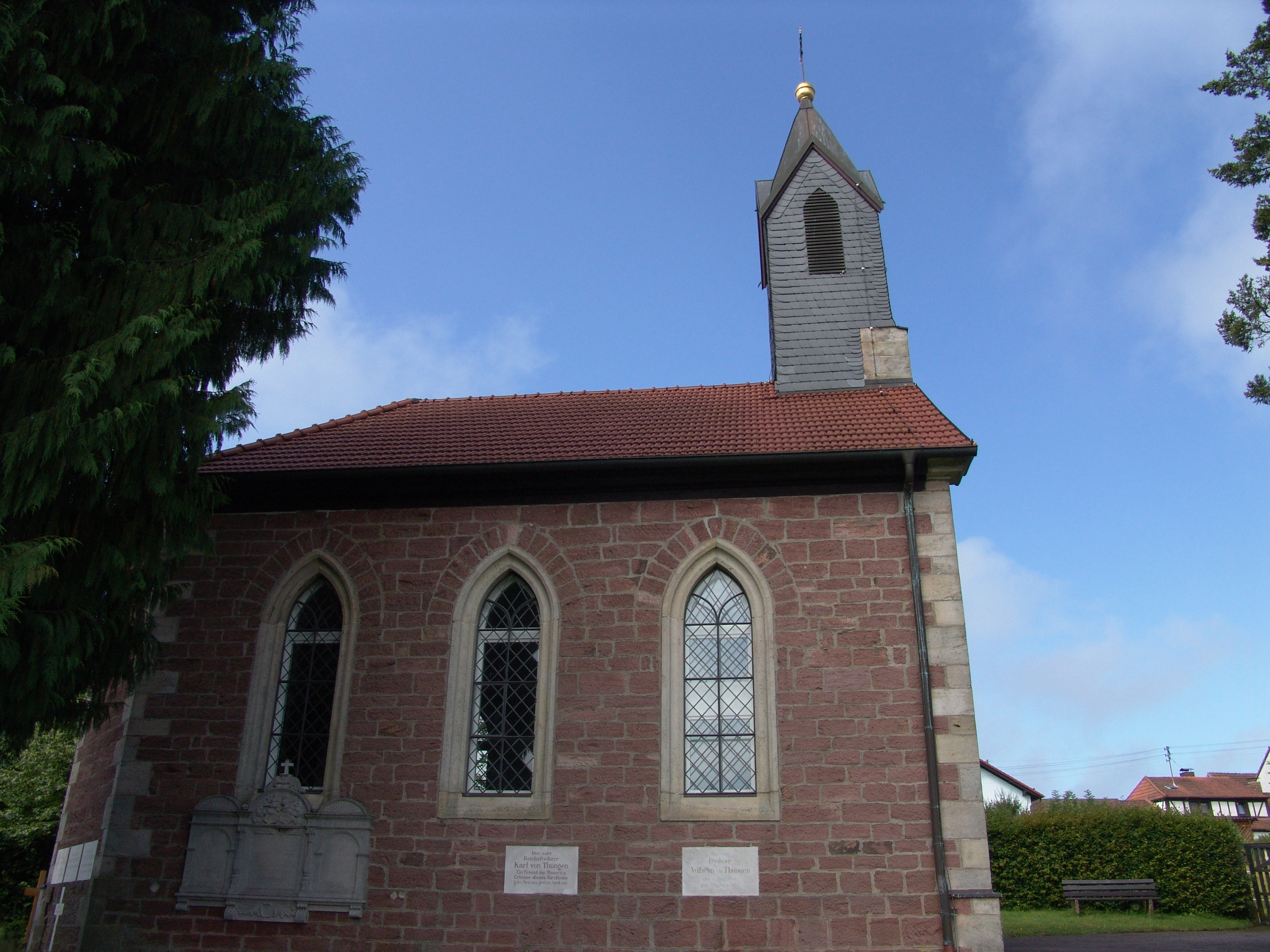 Auferstehungskapelle und Friedhof derer von Thüngen in Roßbach